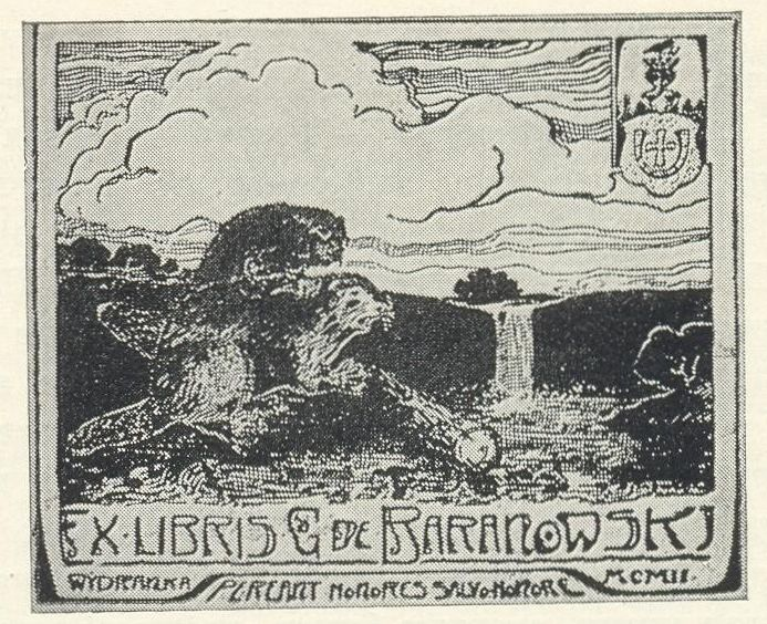 Экслібрыс Е. Бараноўскага (1902). В. Н. Шмідт. Чатырохкантовы. 74Х89 мм.Аднакаляровы. 1902 г. (Бібліятэка Бараноўскага з Выдранкі, каля Клімавіч, вядомая і ў Заходняй Еўропе, складалася з шматлікіх кніг на розных мовах. Знішчана за часамі грамадзянскай вайны)